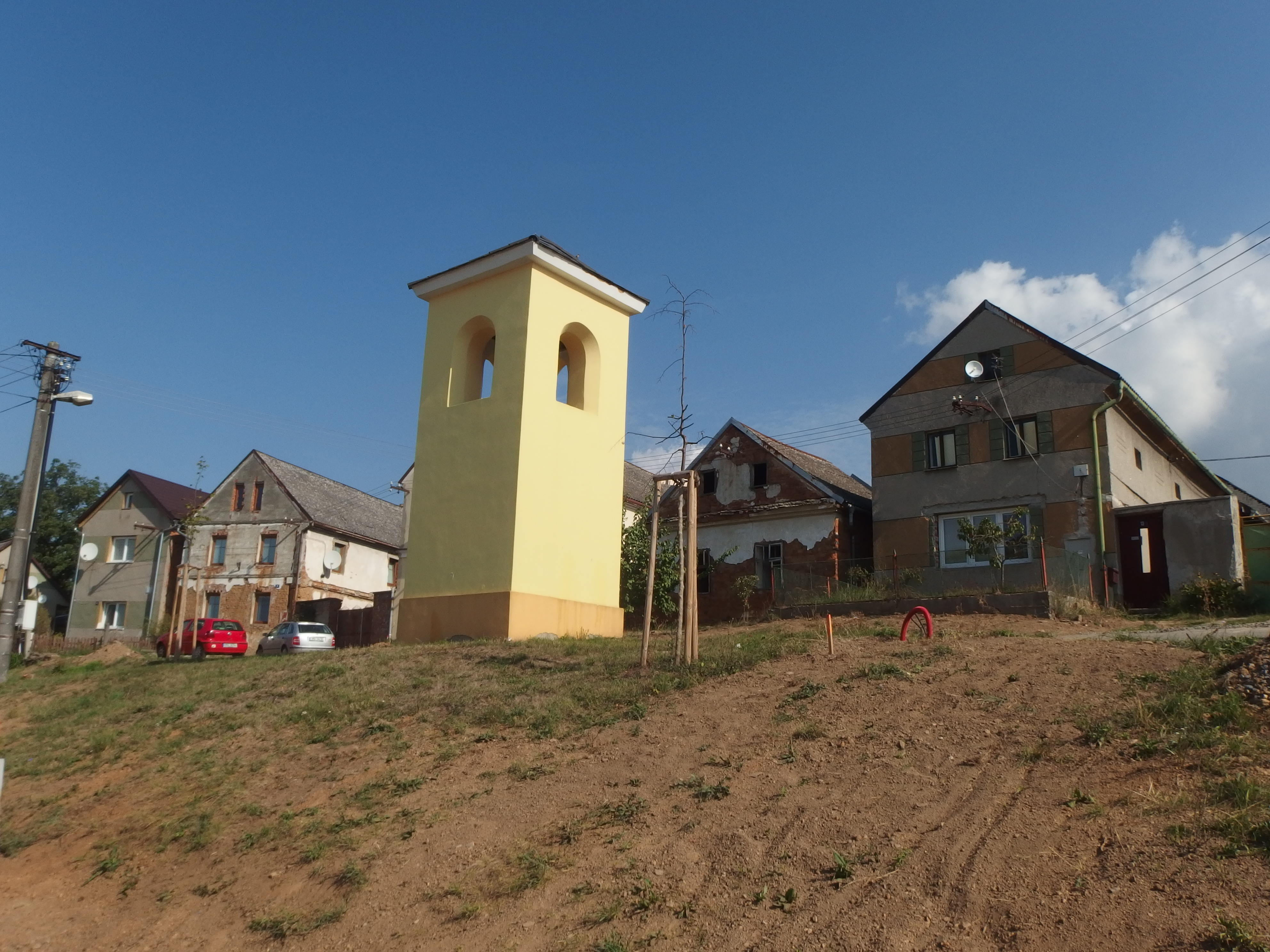 Šternberk, okres Olomouc, část Krakořice.